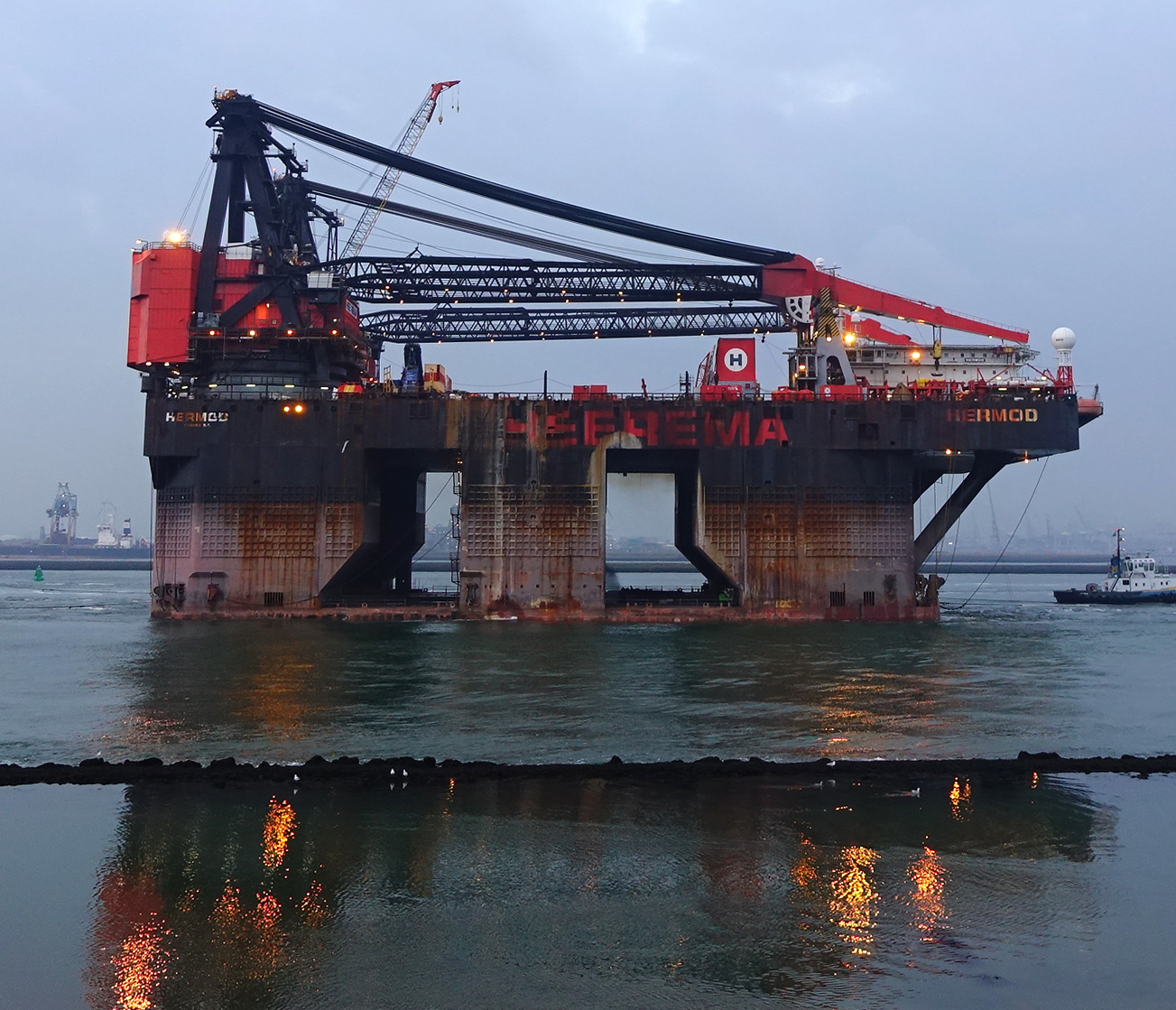 Nieuwe Waterweg t.h.v Hoek van Holland 23-9-2014